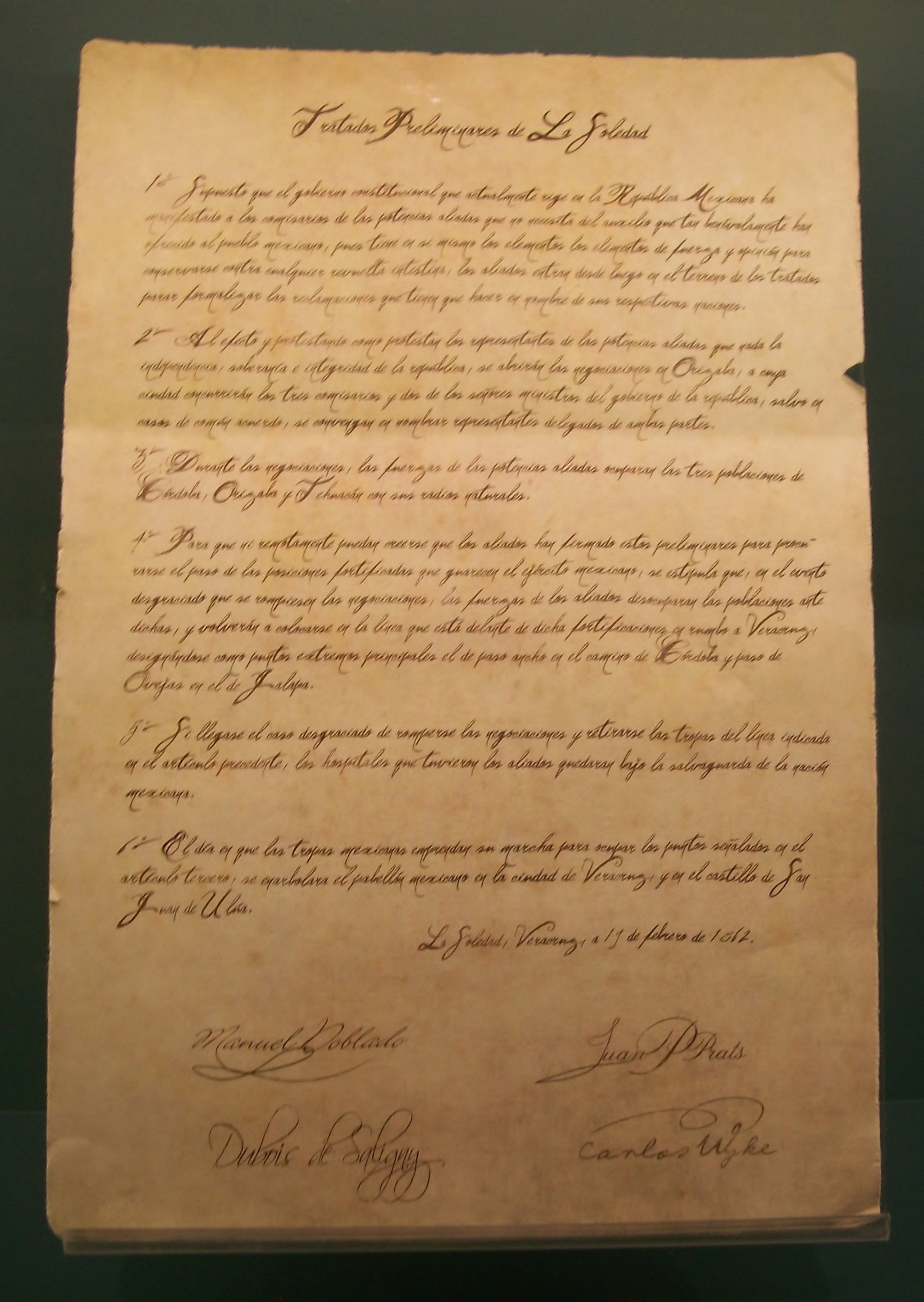 Reproducción de los Tratados Preliminares de la Soledad, firmados el 18 de febrero de 1862. Museo Nacional de las Intervenciones, Ciudad de México, México.